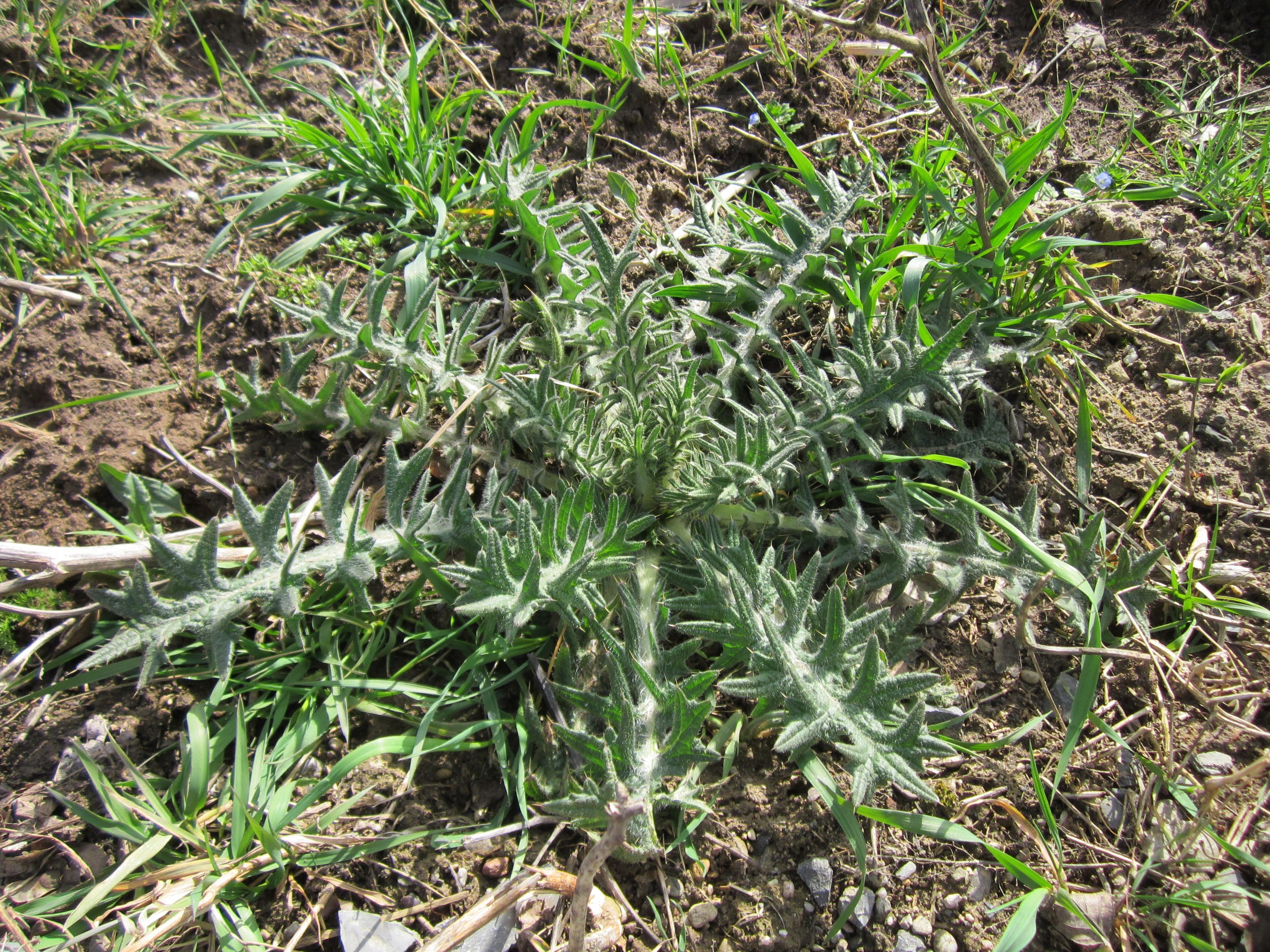 Weg-Distel (Carduus acanthoides) im Hockenheimer Rheinbogen